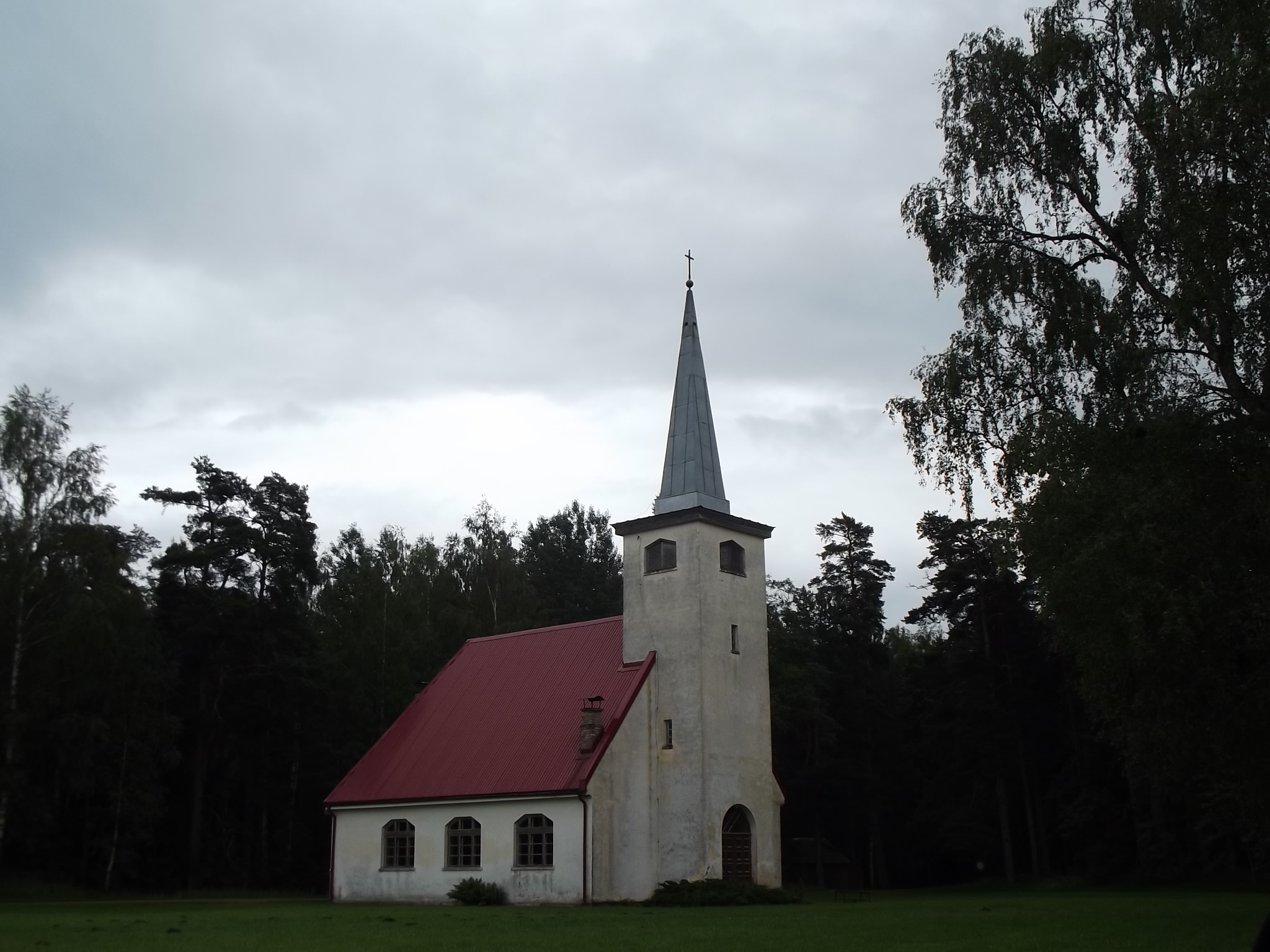 Dzedru luterāņu baznīca